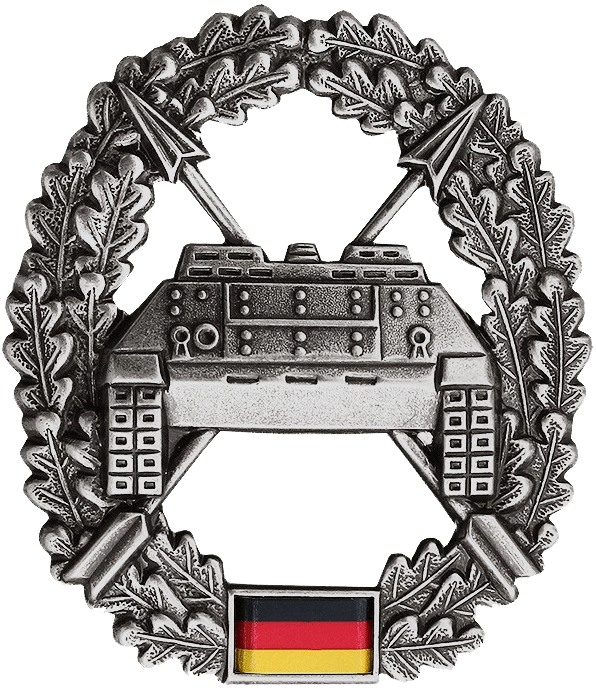 Barettabzeichen der Panzerjägertruppe der Bundeswehr Barettfarbe: Schwarz Maße: Hoch: 53mm Breit: 46mm Ausführung: altsilber, Metall